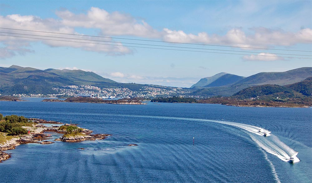 Ulsteinvik von der Herøybrua aus gesehen.